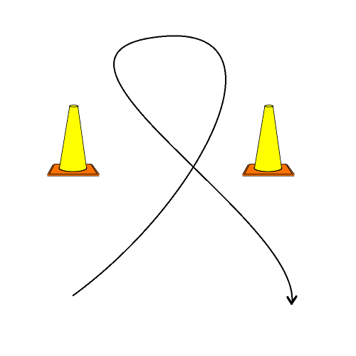 Jedna z figur które mogą wystąpić na torze w zawodach motocyklowych Gymkhana.